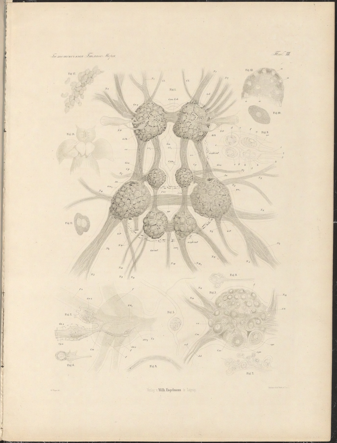 Нервная система Clione limacina. Иллюстрация из книги "Беспозвоночные Белого моря" Вагнер Н.П. 1885